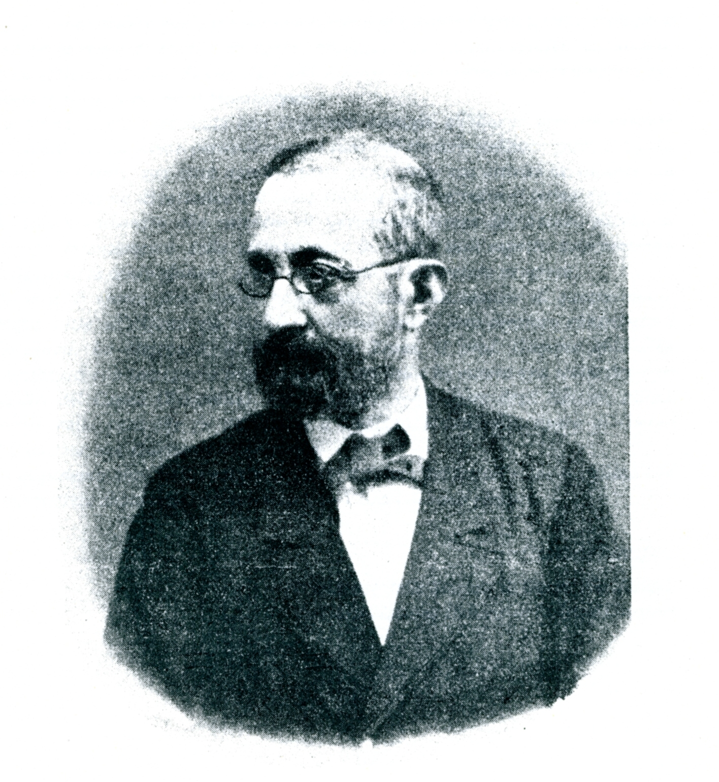 ritratto